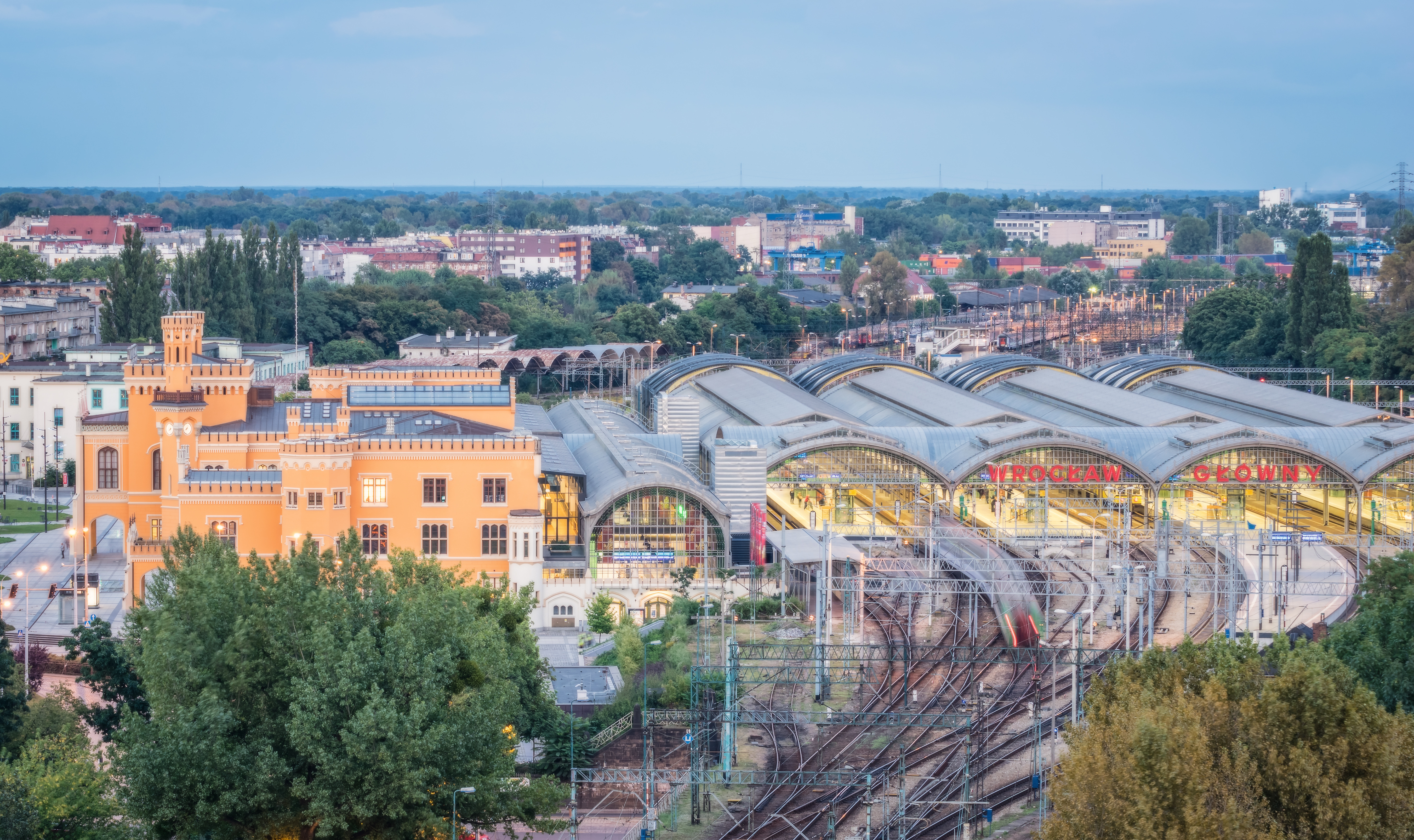 Wrocław, zespół Dworca Głównego, widok o zmierzchu